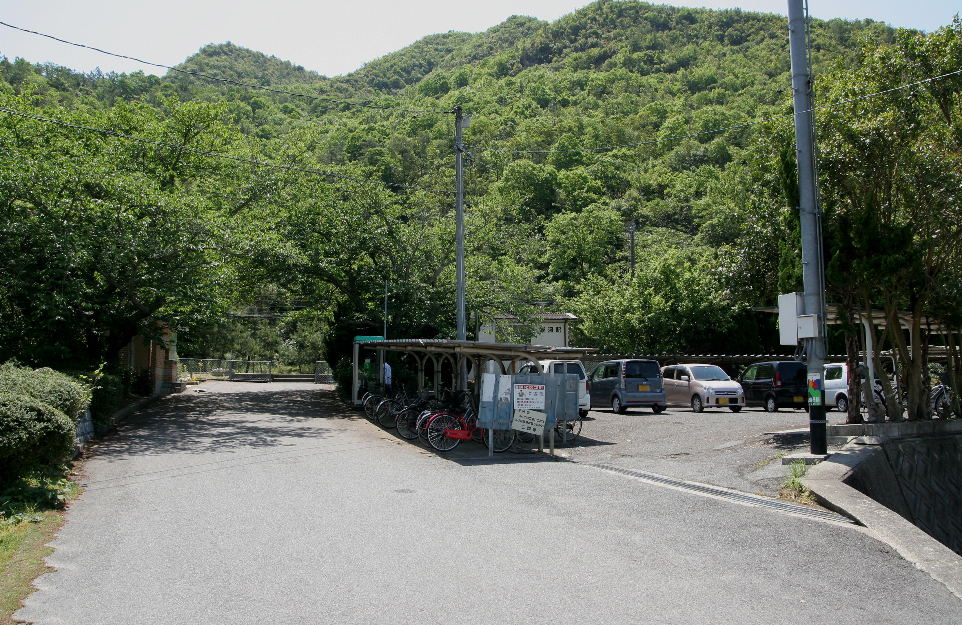 寒河駅の駅舎全体